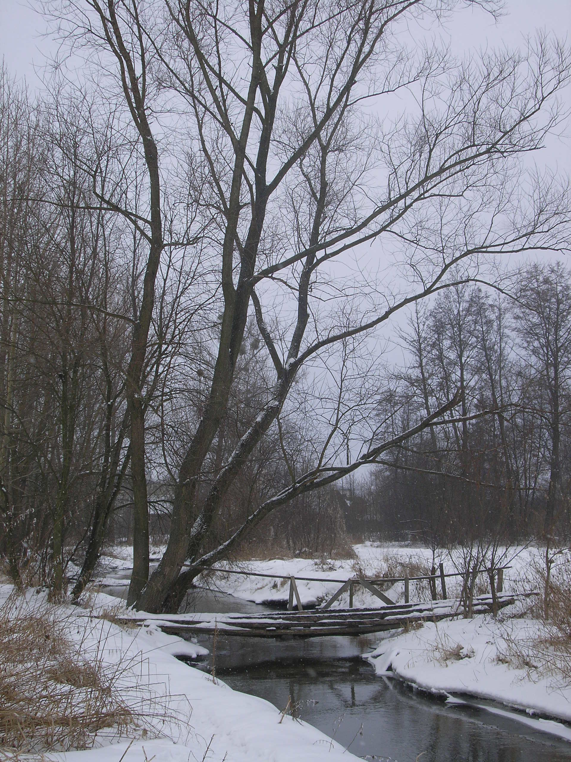 Kurówka River in Chrząchów, Poland